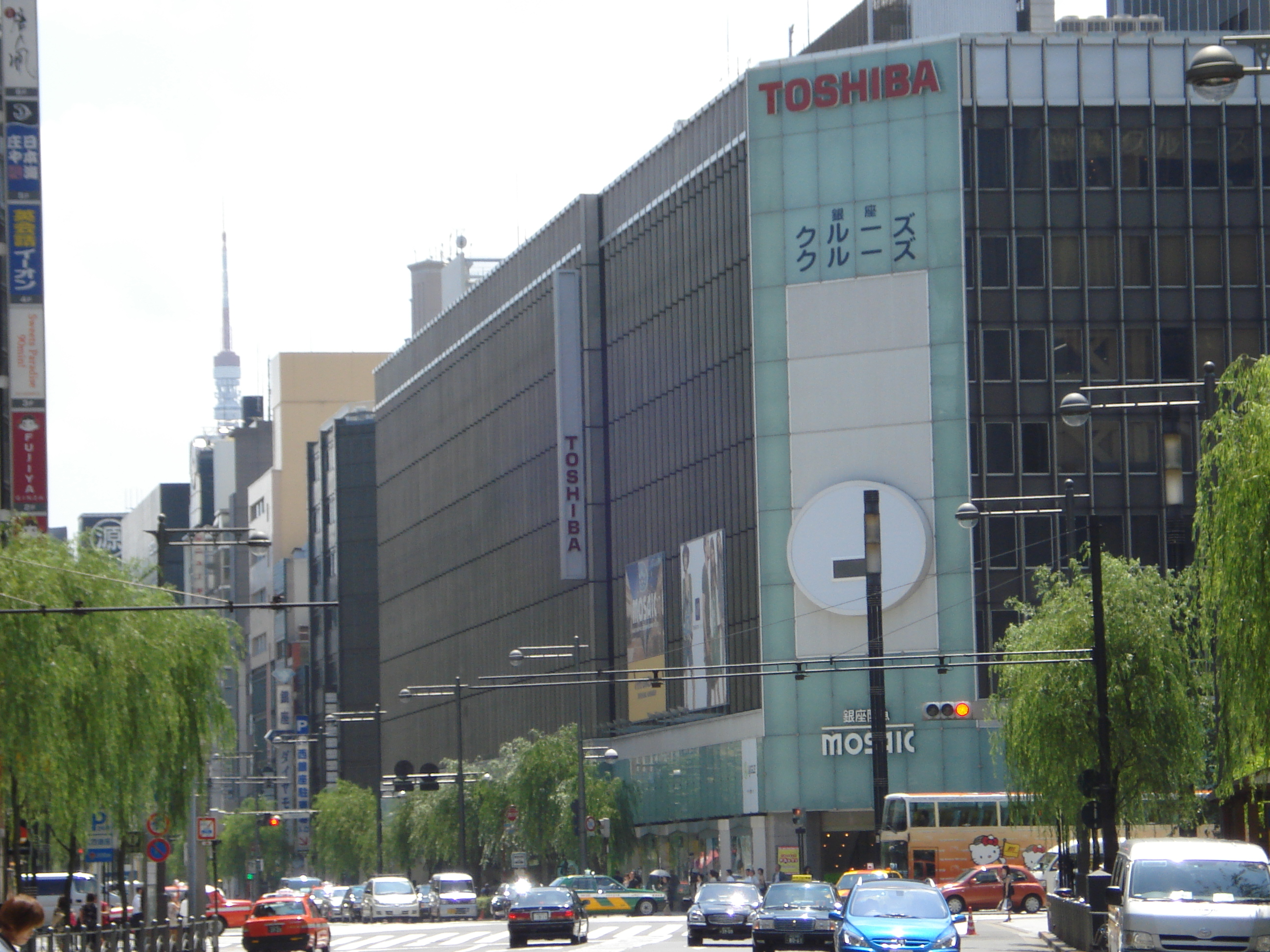 Ginza toshiba Building